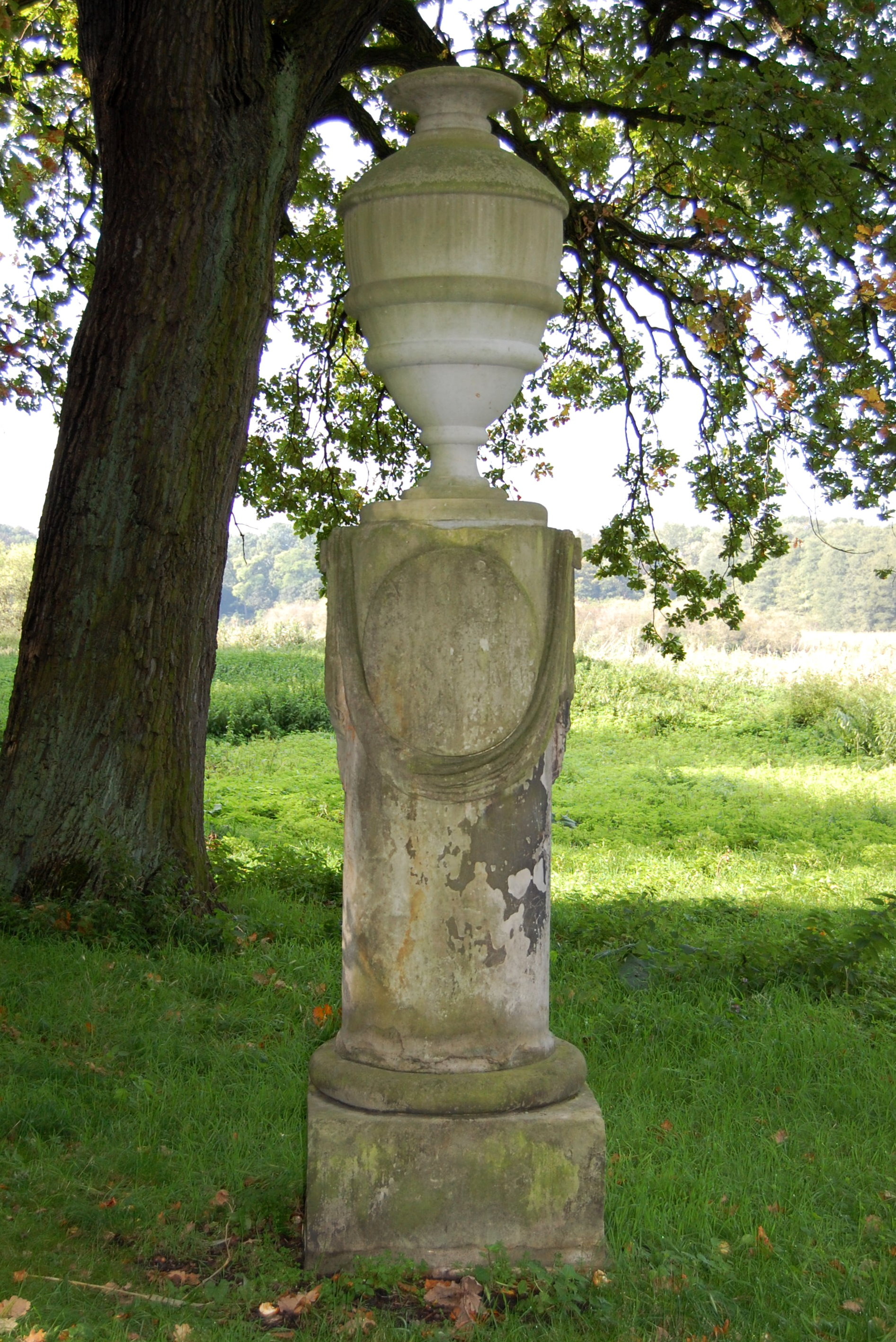 Vater-Hoffmann-Vase im Schlosspark Dieskau